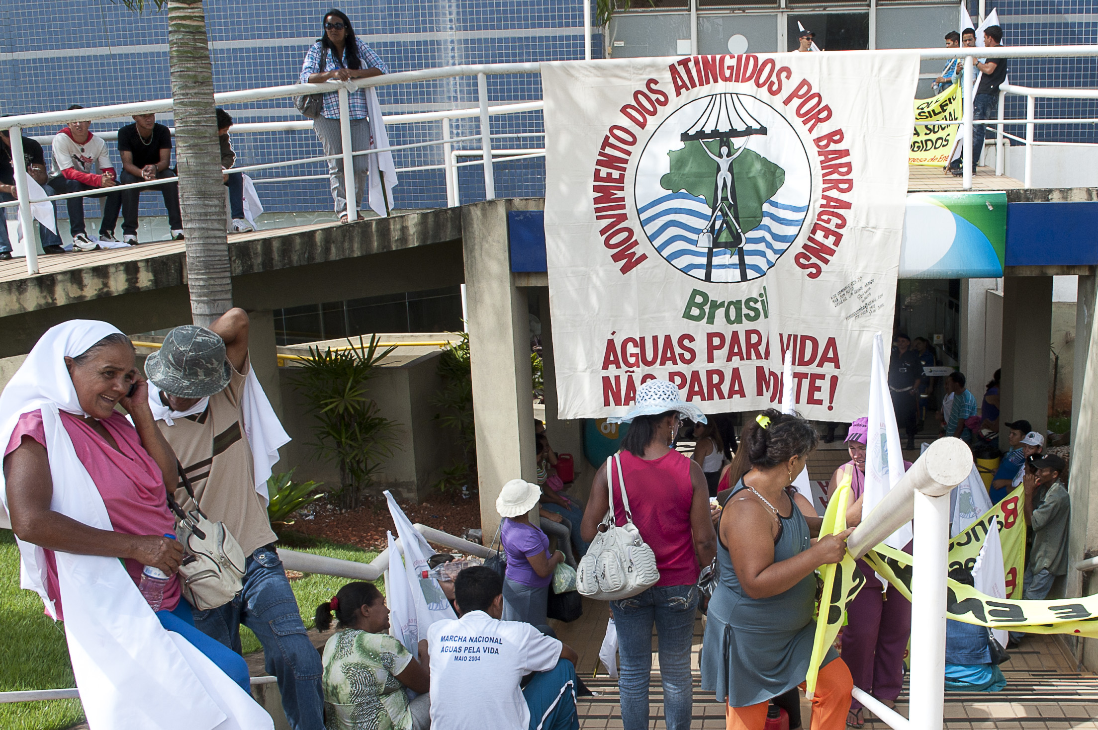 Brasilia - O Movimento dos Atingidos por Barragens (MAB) fez, durante toda a manhã, protestos em frente à Eletronorte, com o objetivo de reivindicar, do governo, a criação de uma política específica para a área. Segundo a entidade, não há órgão responsável ou política pública para pessoas que tenham sido prejudicadas pela constução de barragens no país